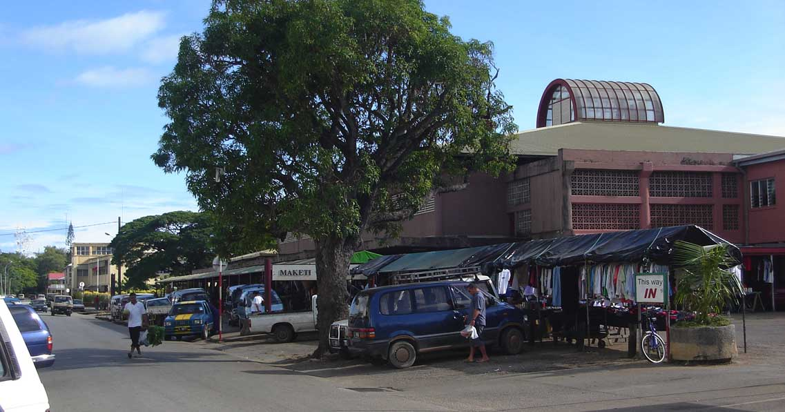 Talamahu market in Nukuʻalofa, Tonga